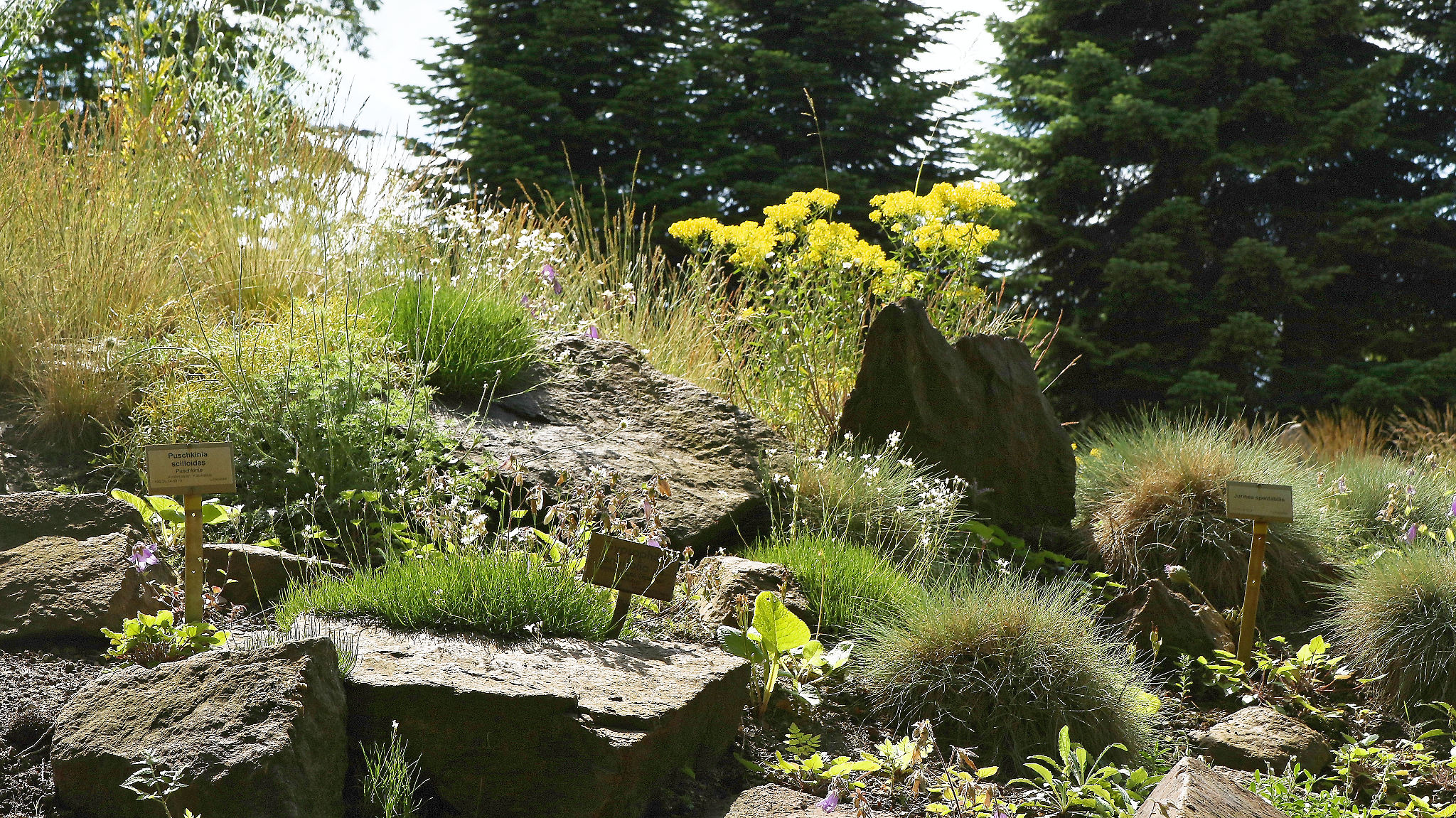 Alpinpflanzen zwischen Gebirgsgestein